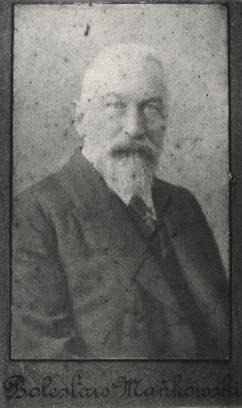 Bolesław Mańkowski (ur. 20 listopada 1852 w Lubaczowie, zm. 26 sierpnia 1921 we Lwowie) – polski pedagog, bibliotekarz, archiwista